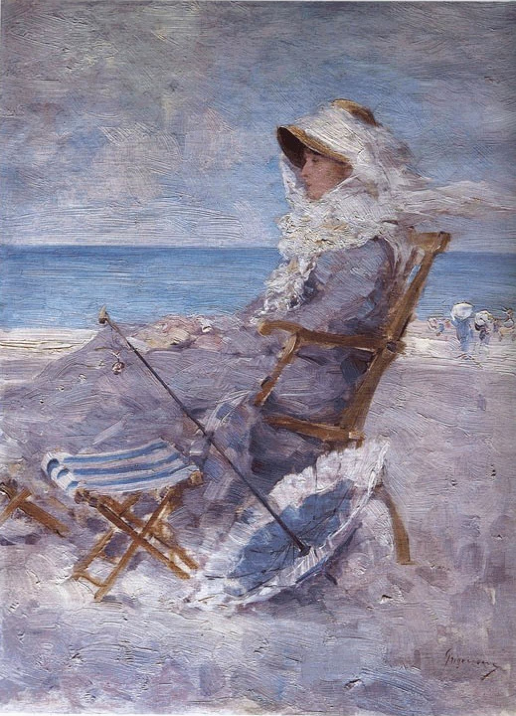 At sea 2